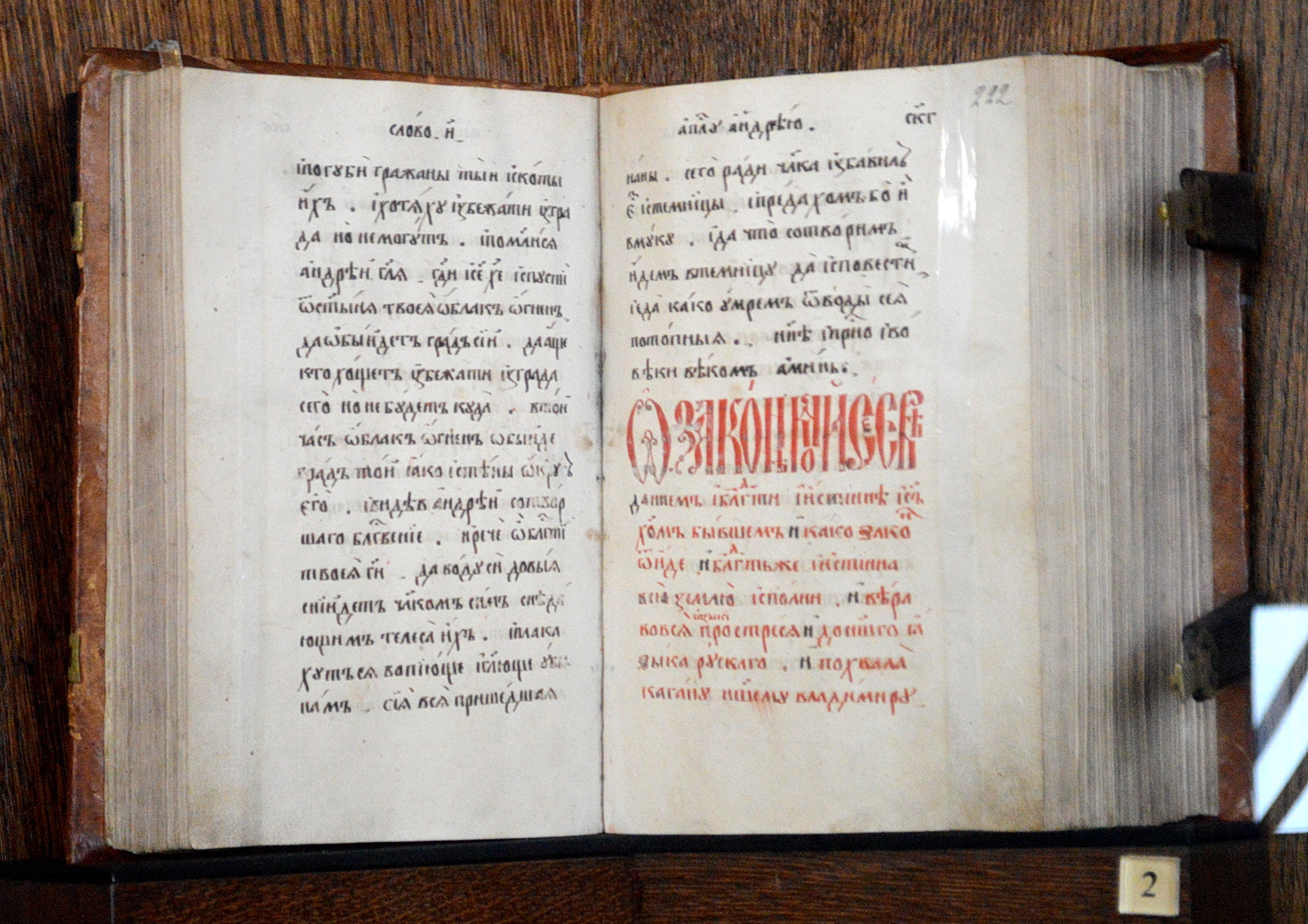 Митрополит Иларион. Слово о законе и благодати. Середина 11 в. Список в составе сборника 40-х годов 17 в. Бумага, чернила, киноварь; почерк - полуустав, ваглавие - вязью; переплёт 19 в. - дерево, кожа, медь.